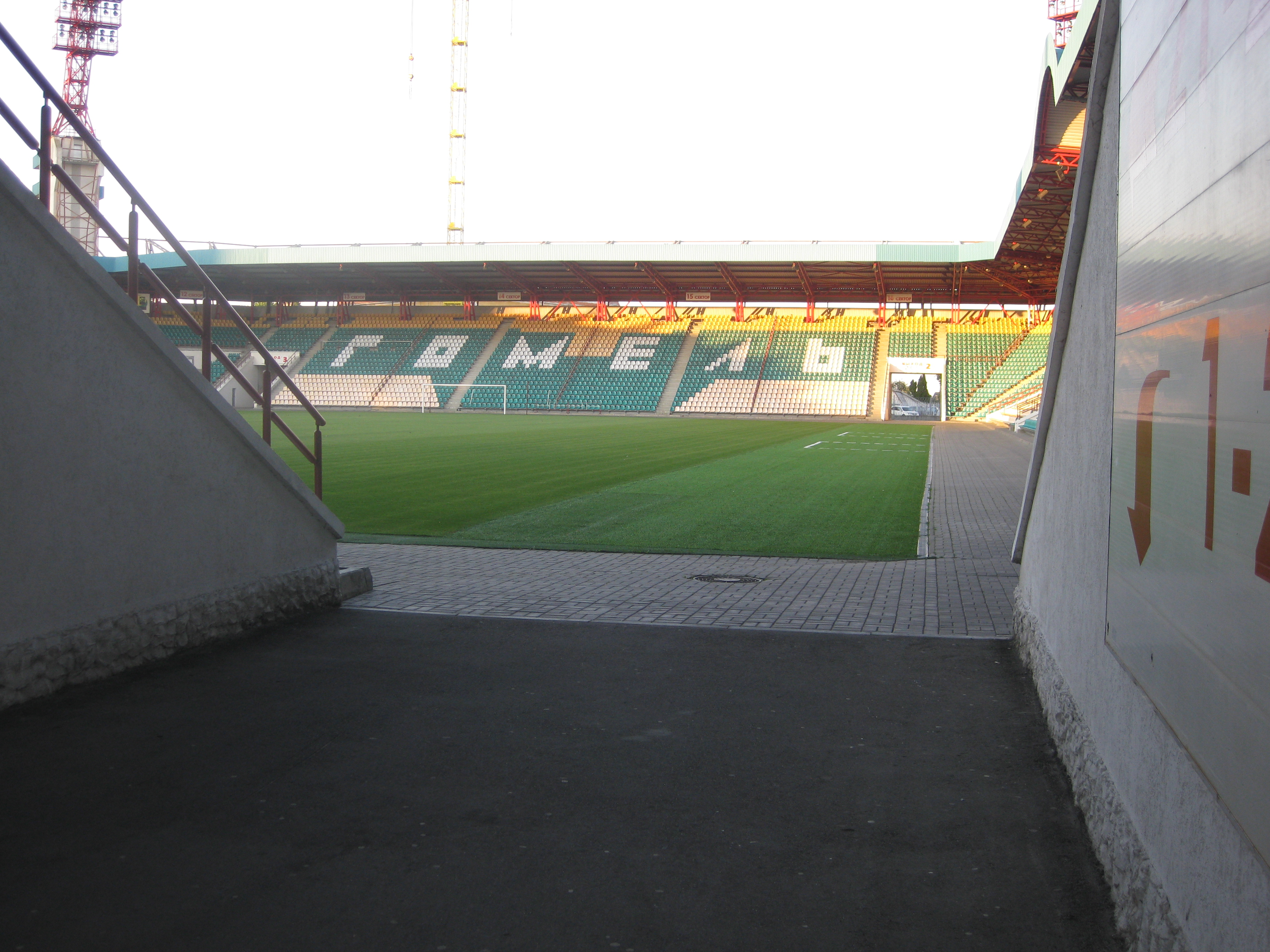 Стадион «Центральный» (Гомель)